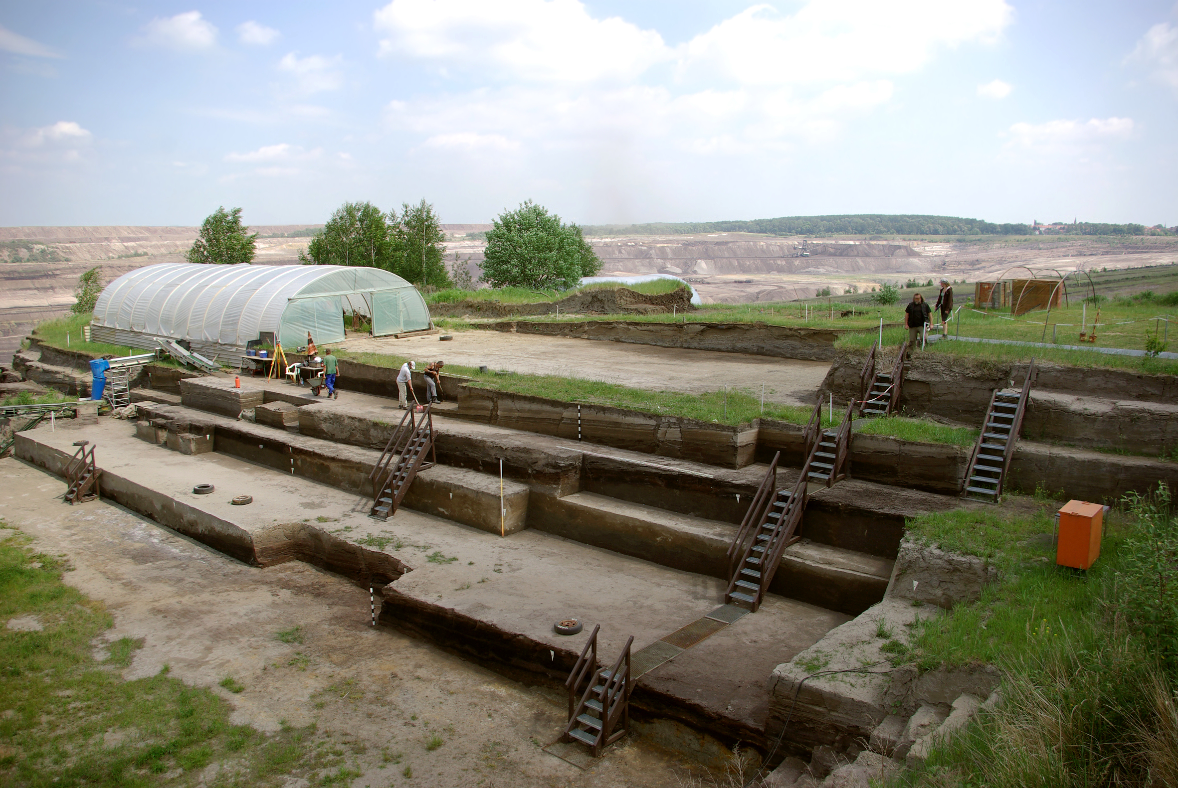 Archäologische Ausgrabung im Tagebau Schöningen, Fundstelle Schöningen 13 II. (Speersockel)